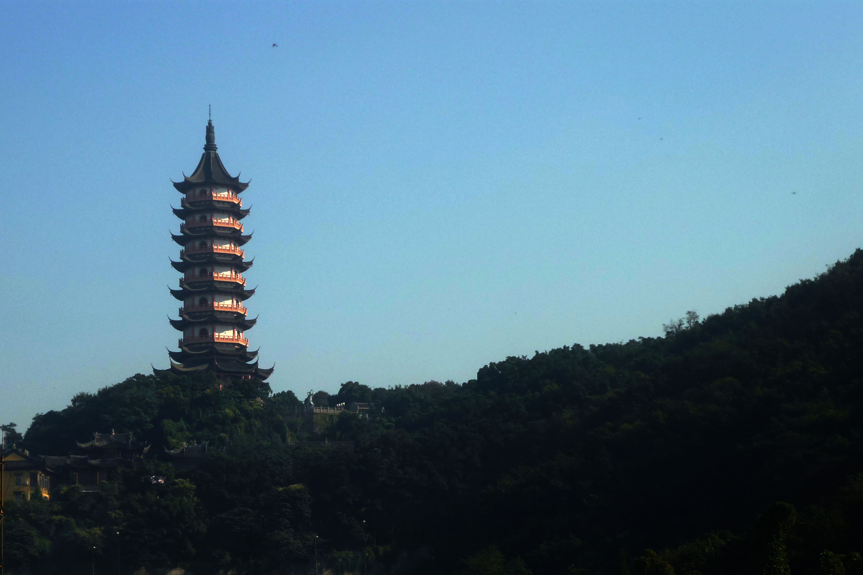 宁波镇海招宝山